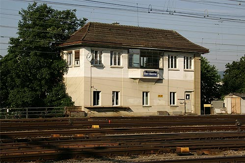 Biel: Stellwerk im Bahnhof Biel